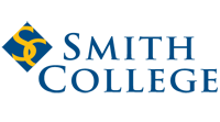 Wappen des Smith College